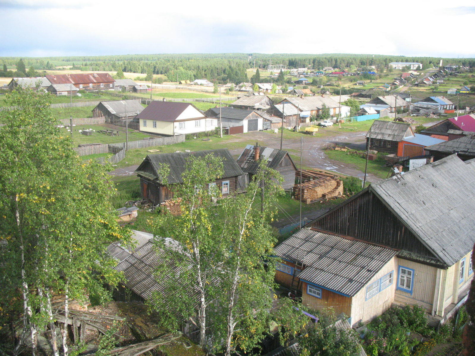 с. Пянтег, вид с колокольни заброшенной церкви Ильи Пророка